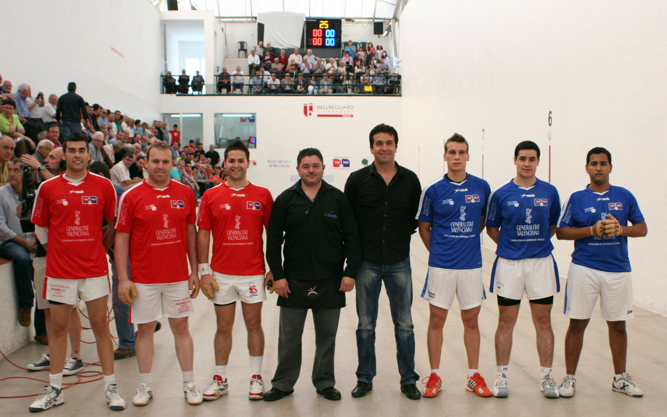 masters generalitat raspall6